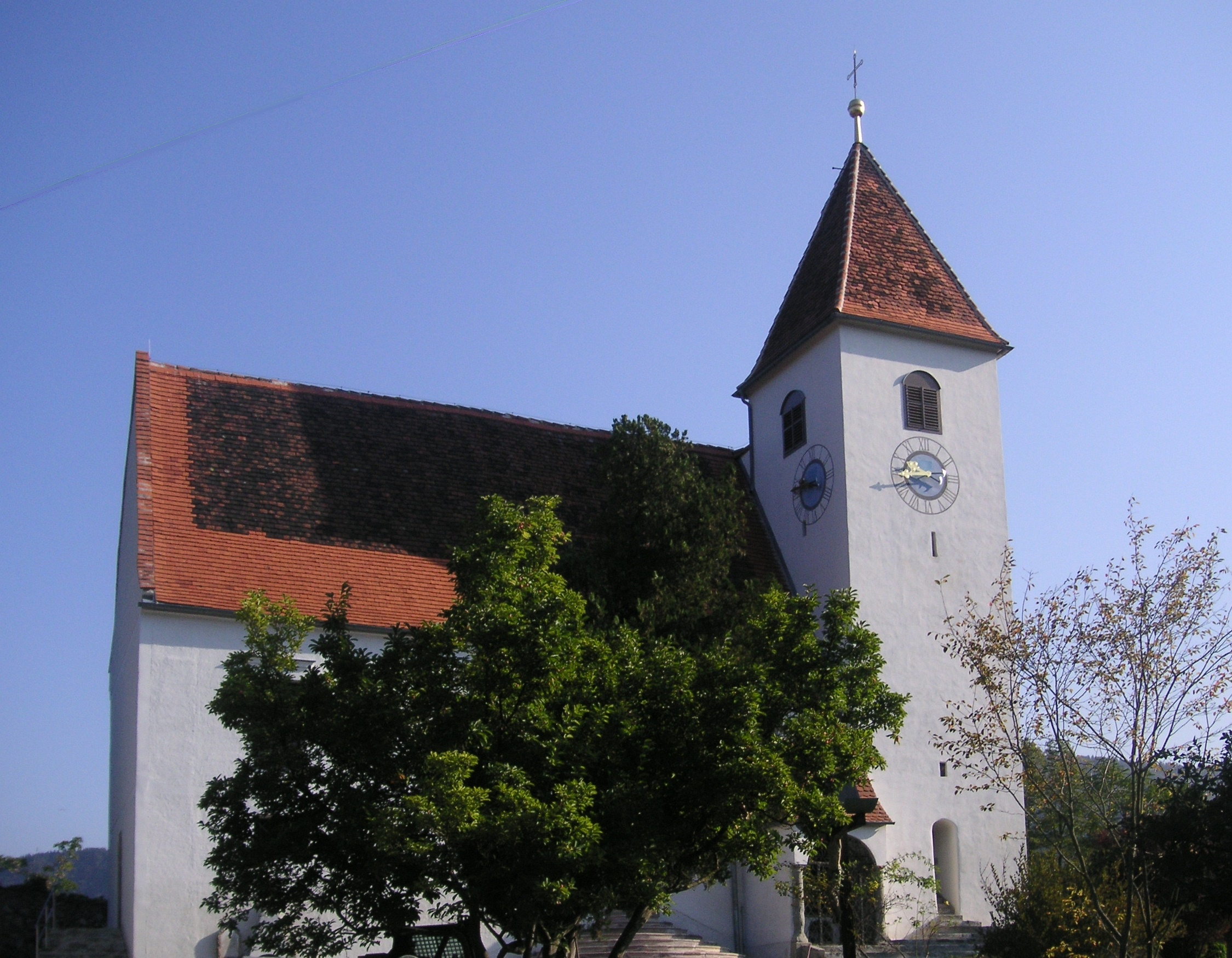 Kath. Pfarrkirche hl. Martin und Kirchhof mit Ummauerung in Deutschfeistritz